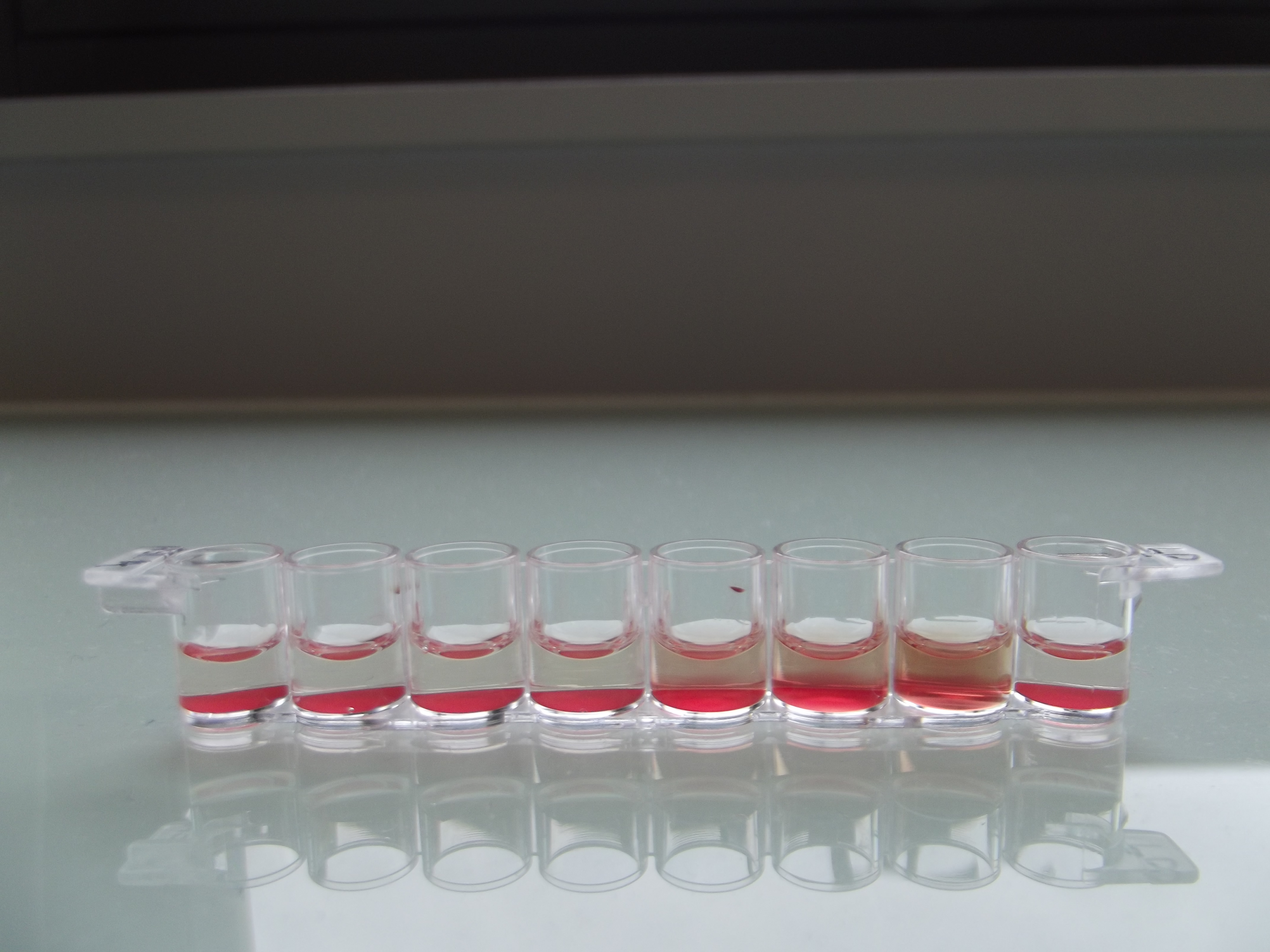 Dosage des anticorps anti streptolysine O dans le diagnostic des complications post streptococciques